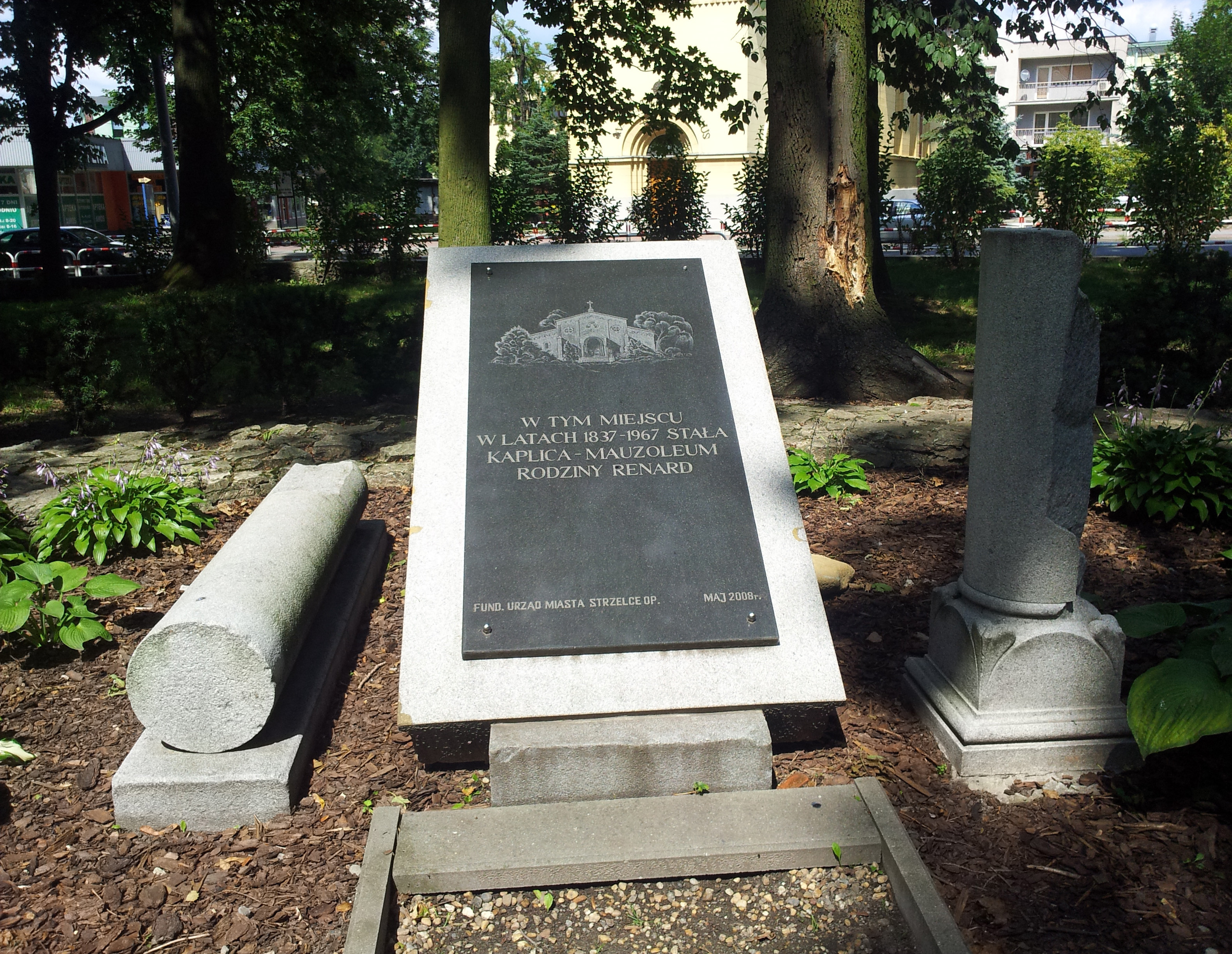 Tablica znajdująca się w parku w Strzelcach Opolskich upamiętniająca kaplicę-mauzoleum rodziny Renard rozebraną w latach 60. XX wieku